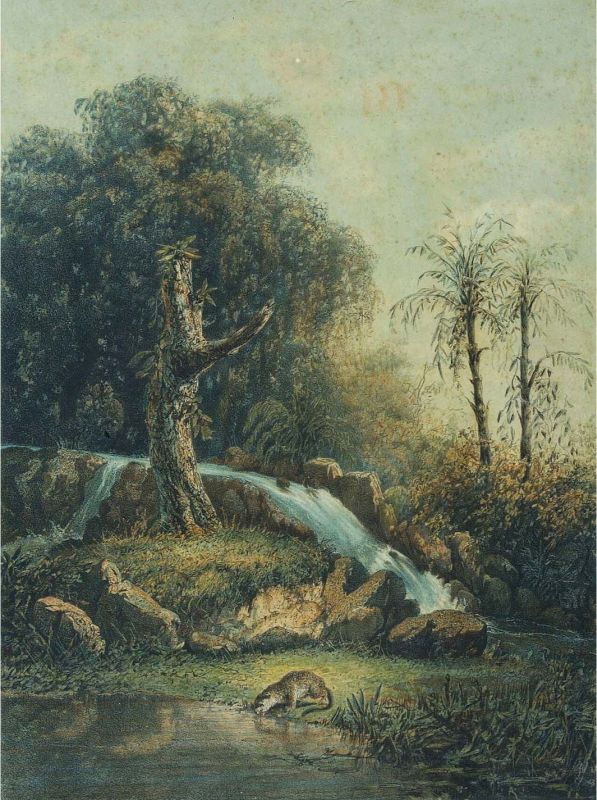 Litho. Litho naar een oorspronkelijk schilderij van A. Salm. Oorspronkelijke titel onbekend.. Landschap op Java